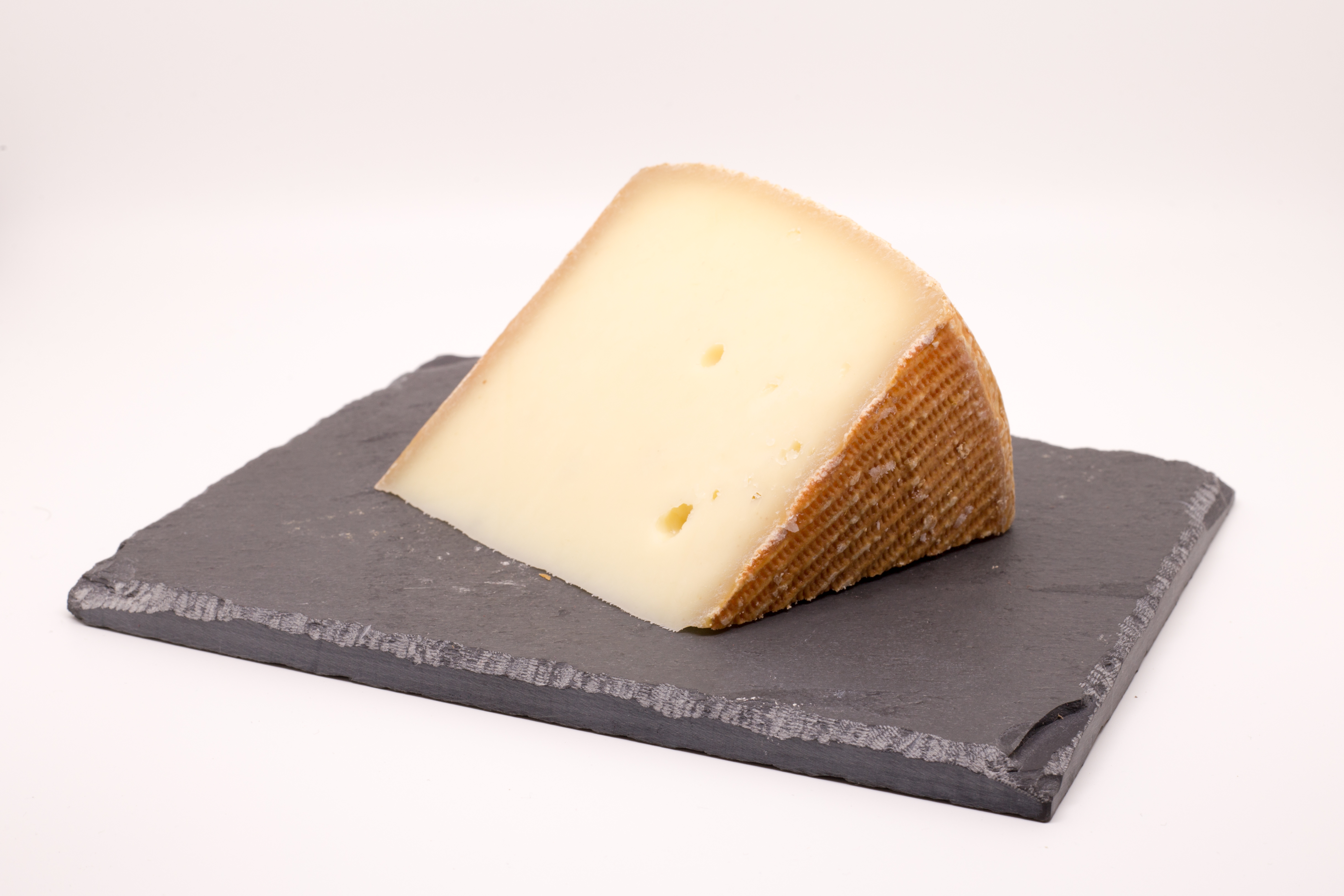 Fromage Zacharie Cloutier de la Fromagerie Nouvelle France (Estrie).